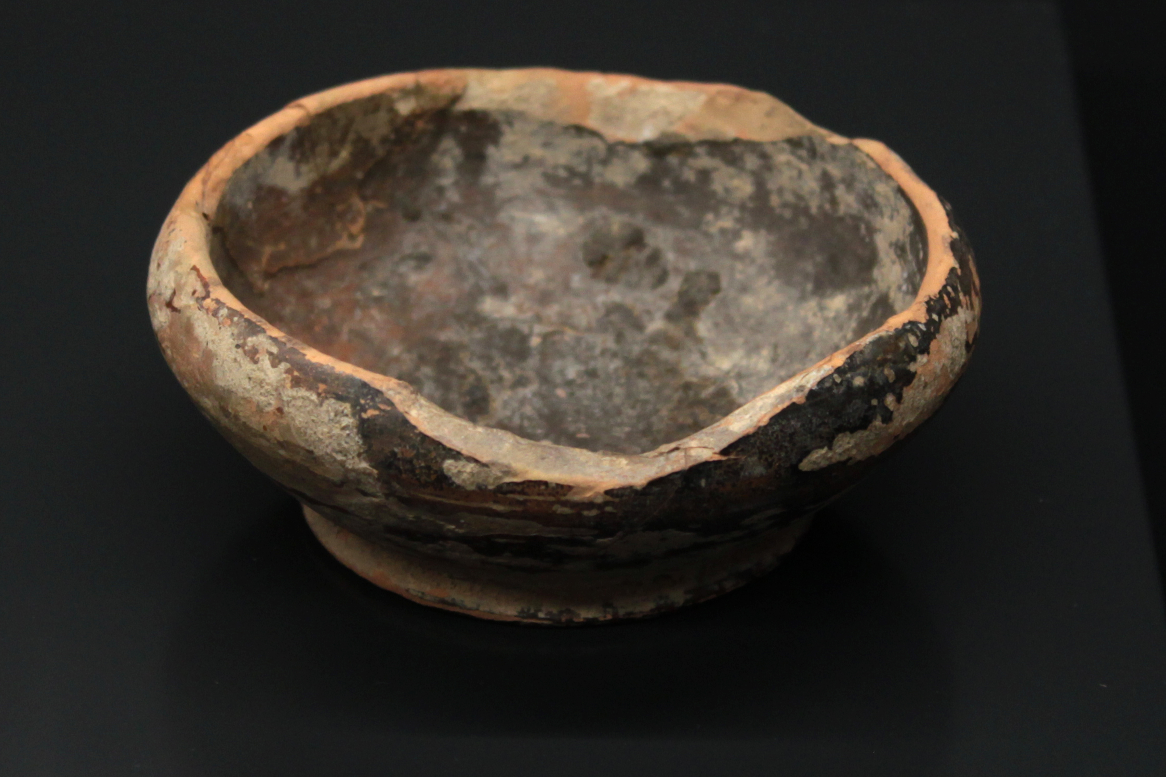 Cuenco ático correspondiente a entre los siglos IV y III a.C. localizado en un yacimiento de la Calle Baluarte de Algeciras. Museo municipal de Algeciras, Andalucía, España.